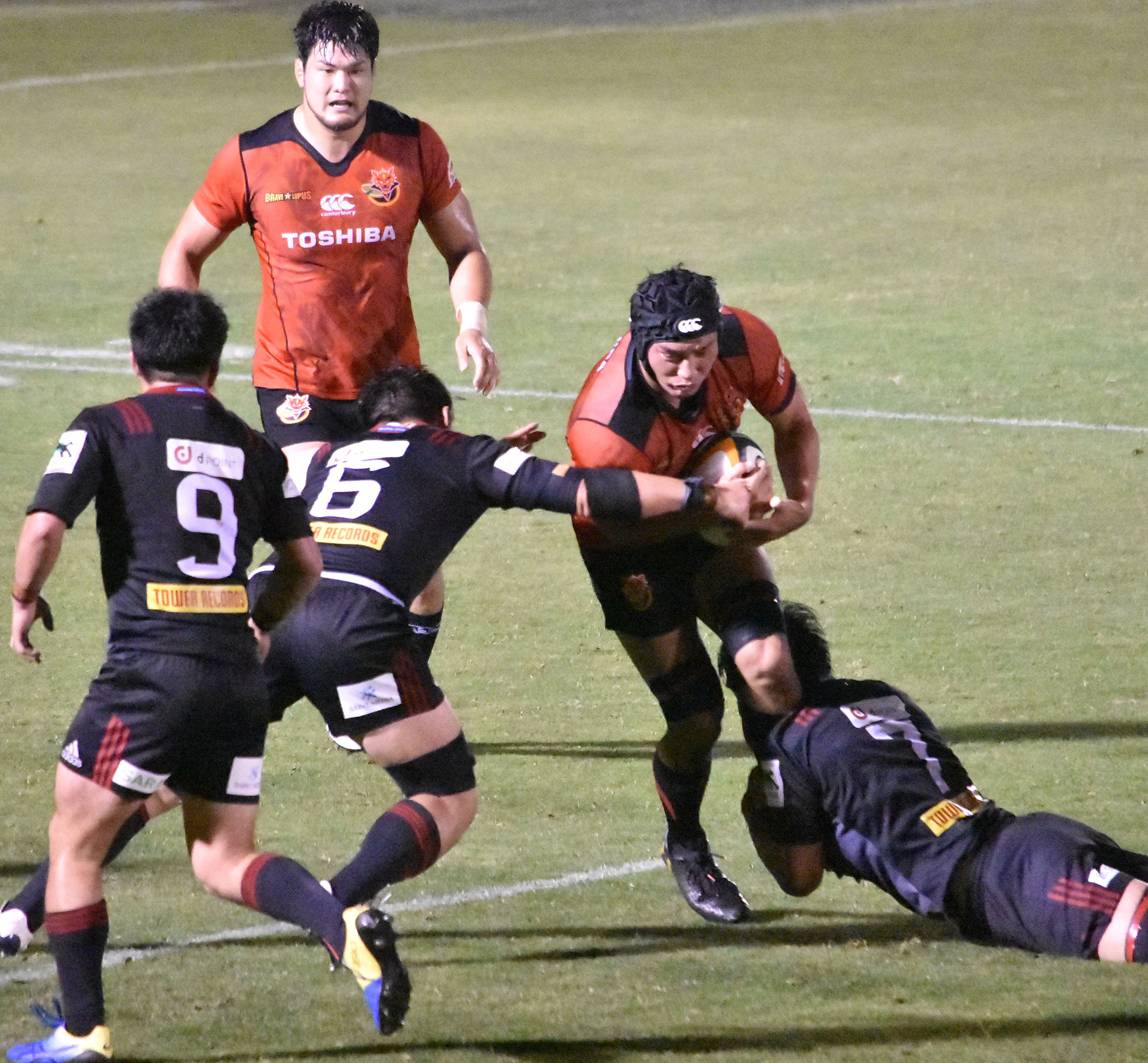 山本 浩輝